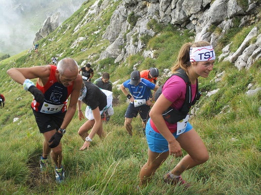 le ventre a terre